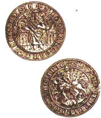 Печать Юрия І Львовича с надписью «Король Руси». XIV cm.